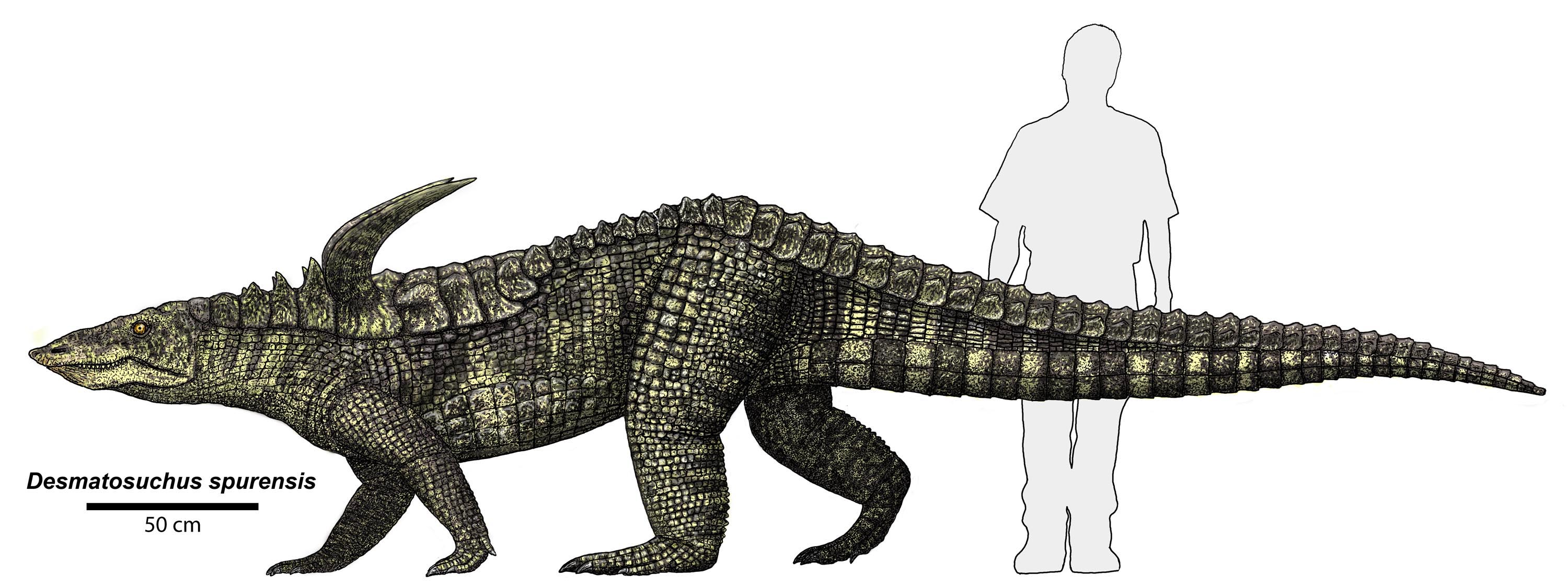 Credit Dr. Jeff Martz/NPS